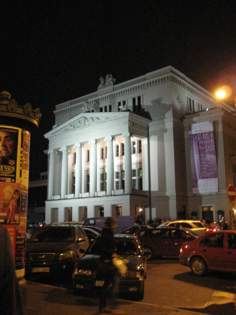 Latvia National Opera